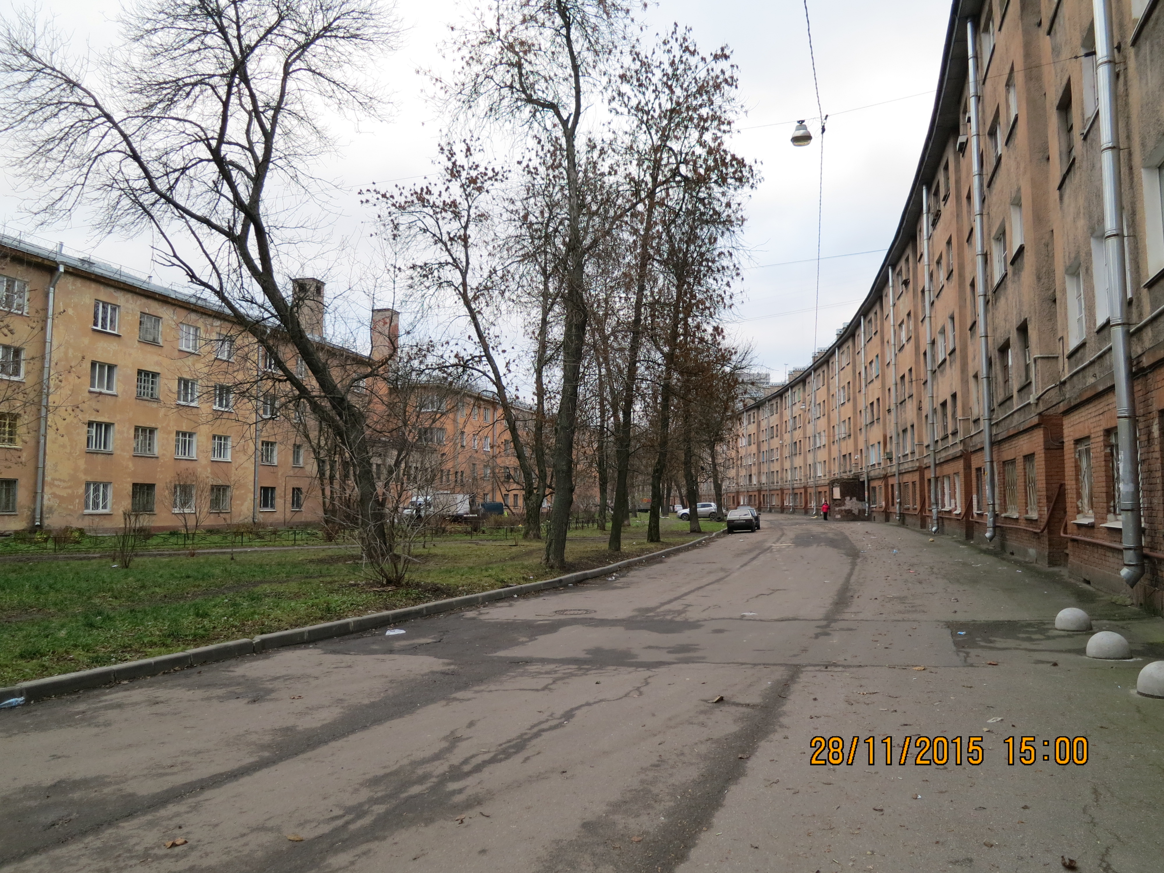 Жилой дом для рабочих эпохи конструктивизма в Щемиловском жилмассиве, благодаря своей изогнутой форме получивший народное прозвище «колбаса». Предположительно архитектор Г. А. Симонов